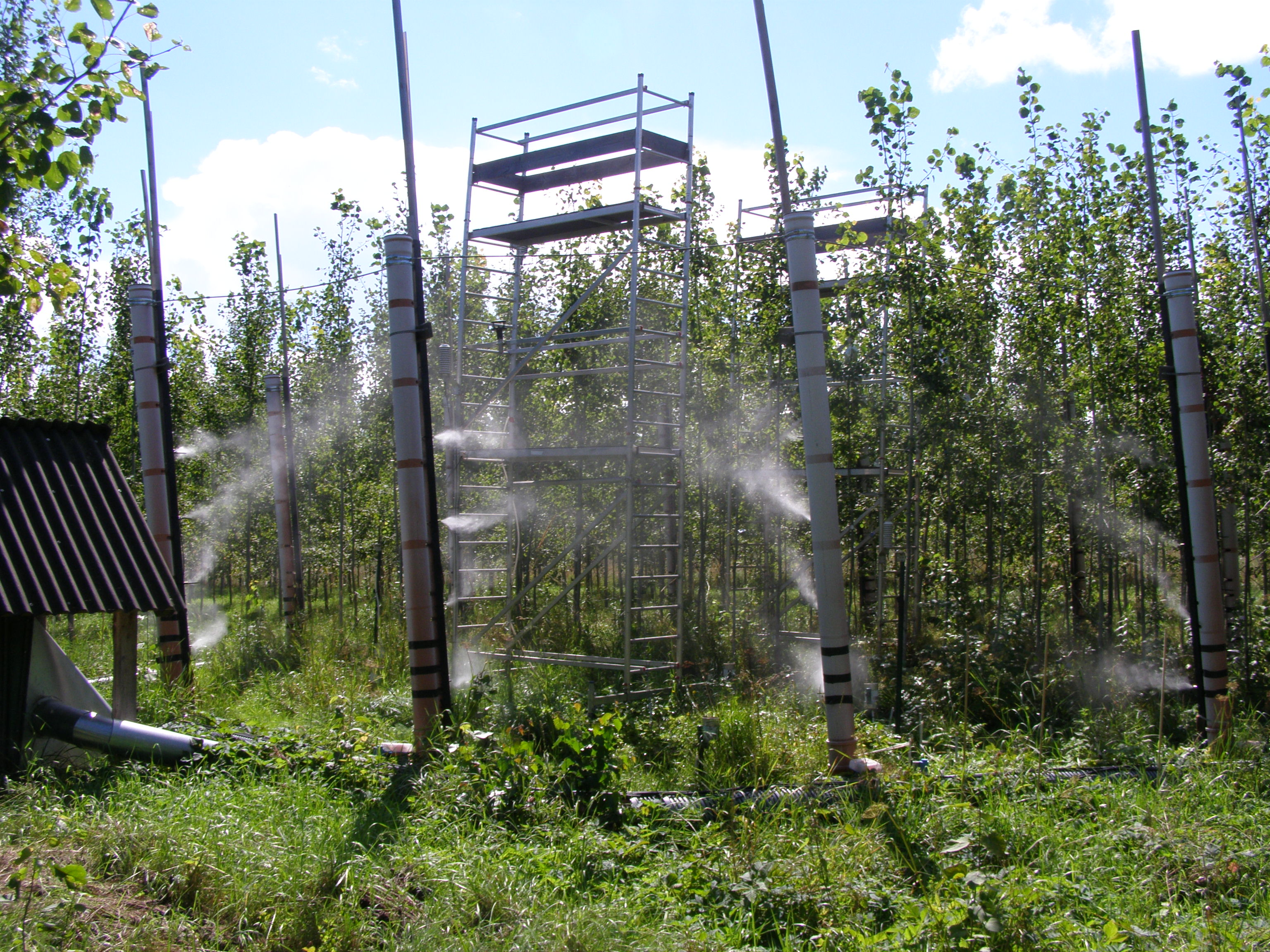 Niisutusring - kui suhteline õhuniiskus langeb alla 75 protsendi, siis toimub niisutusringides õhu niisutamine veeauruga.